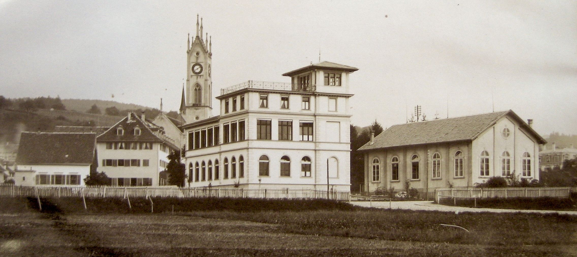 Italienische Villa und Turnhalle im Seminar Küsnacht, um 1900